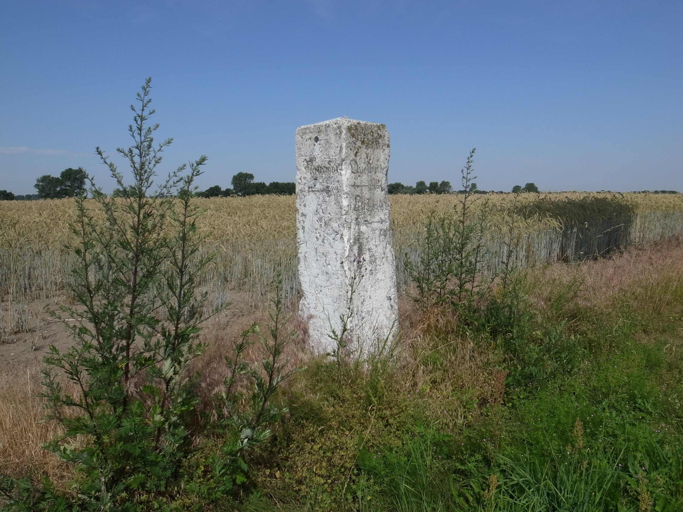 Wegweiser zwischen Quellendorf und Libbesdorf. Inschrift: Quellendorf, Libbesdorf, Naundorf. Maße:153 x 34 x 34cm.